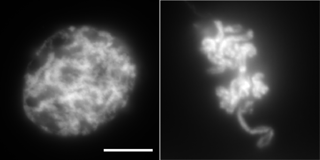 カエル卵抽出液で形成させた核（左）と染色体（右）をDAPIで染色し、蛍光顕微鏡観察した。バーは10 µm。